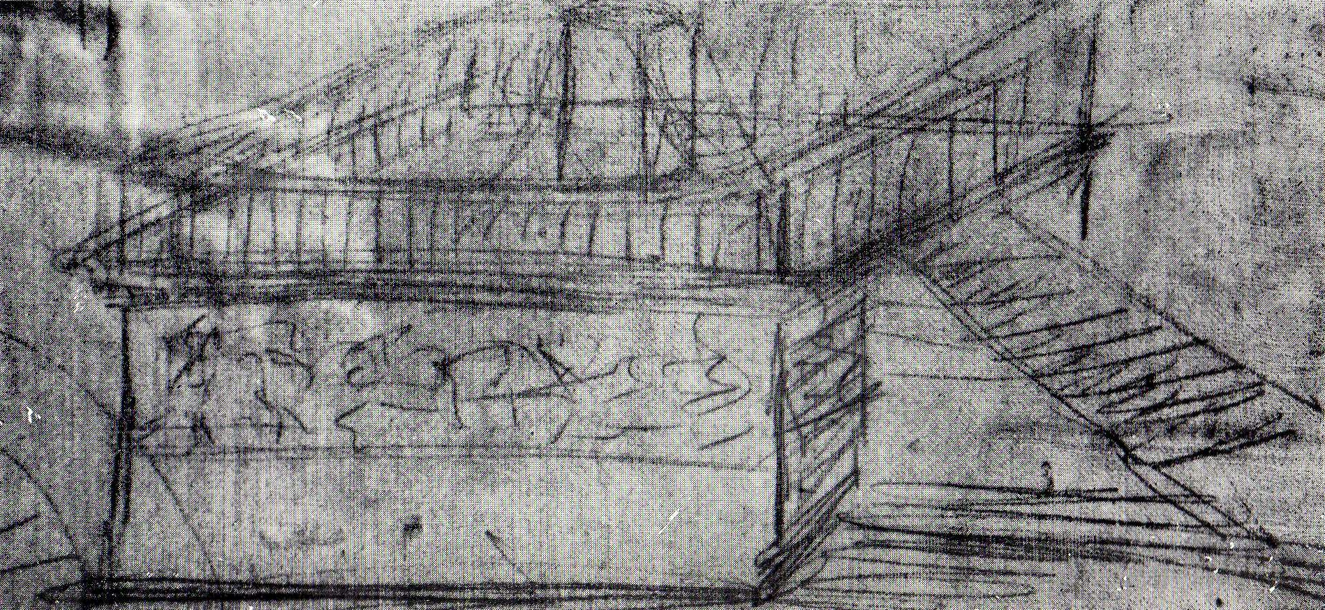 Carl Humann: Erste Ideenskitze zur Rekonstruktion des Pergamonaltars; um 1879